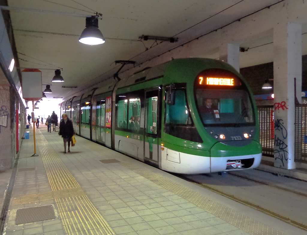 Milano, vettura tranviaria 7133 in sosta alla fermata sotterranea Arcimboldi.